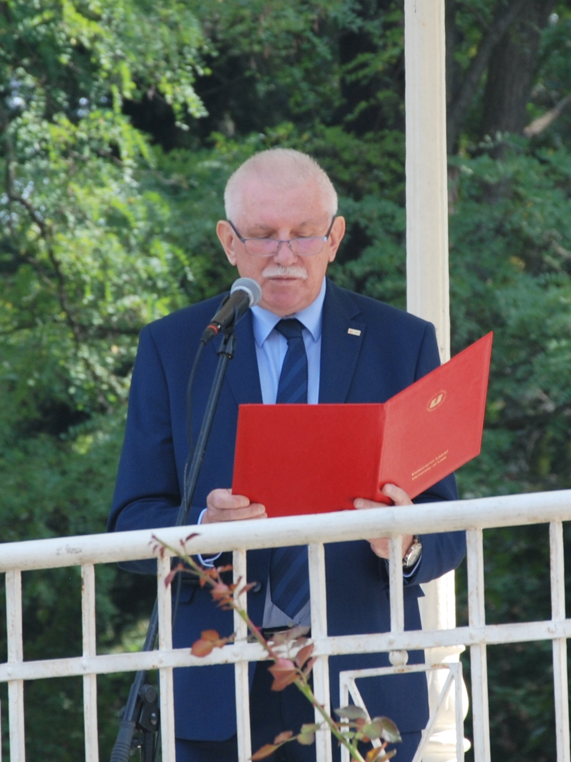 Narodowe Czytanie 2019 w Łodzi, podczas którego były czytane polskie nowele patriotyczne